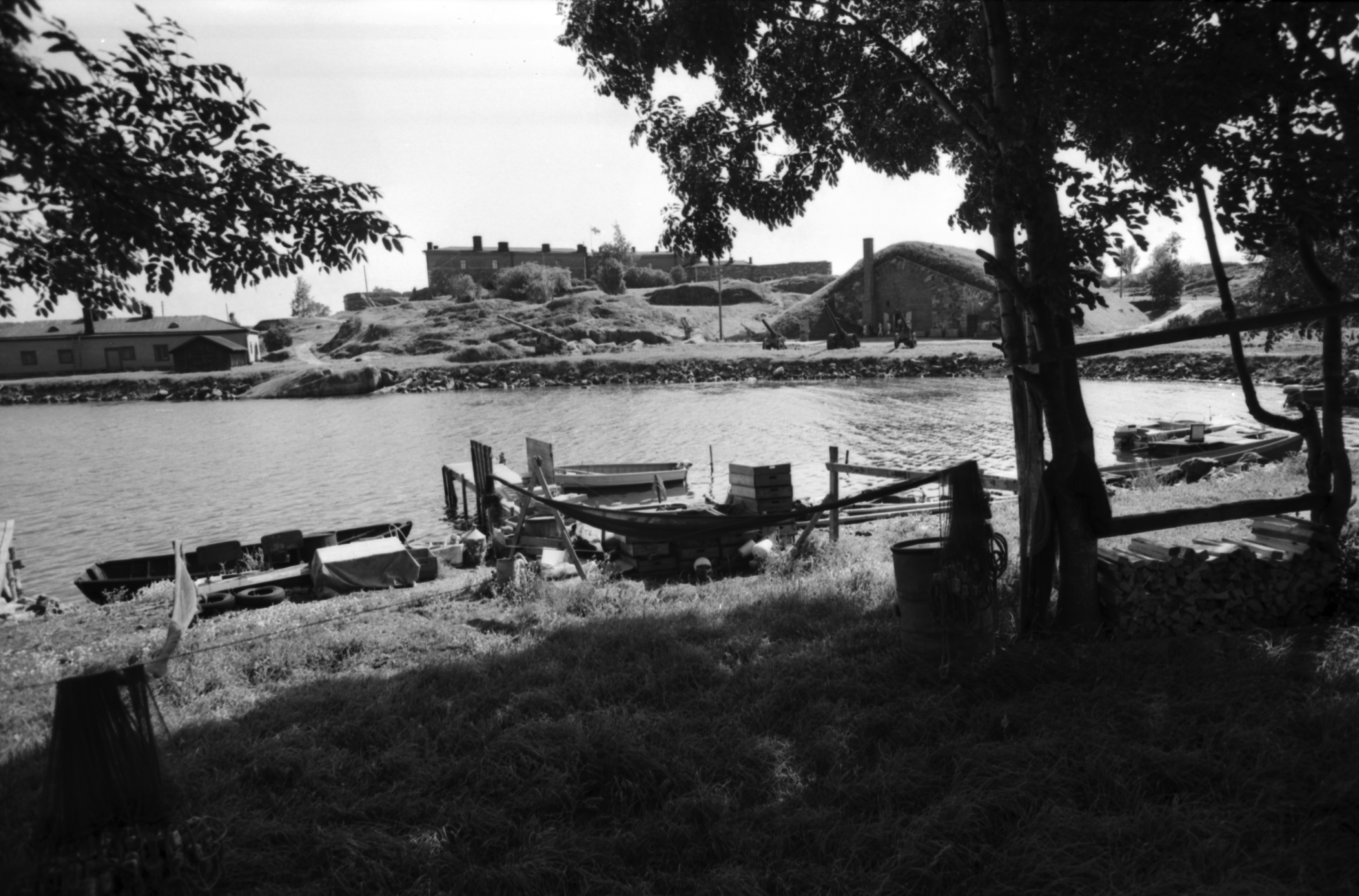 Susisaari. Näkymä Susisaaresta Kustaanmiekan suuntaan. Etualalla veneitä laitureissa. Vastarannalla vasemmalla kurikomppania A3, oikealla ruutikellari A2. Taustalla keskellä bastioni Carpelan ja kurtiini Carpelan - Gyllenborg A5b.